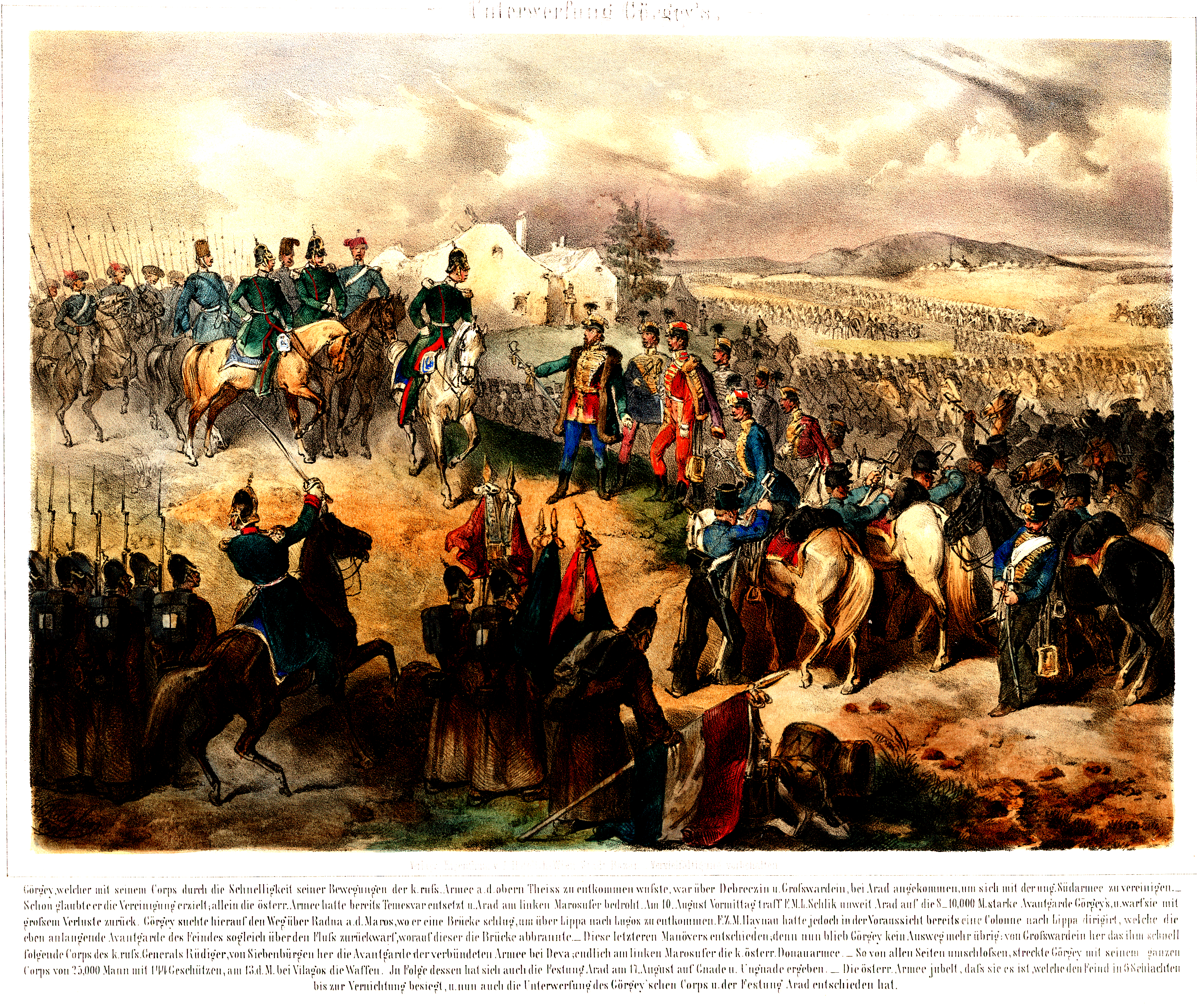 A világosi fegyverletétel az 1848–49-es forradalom és szabadságharc végét jelentette